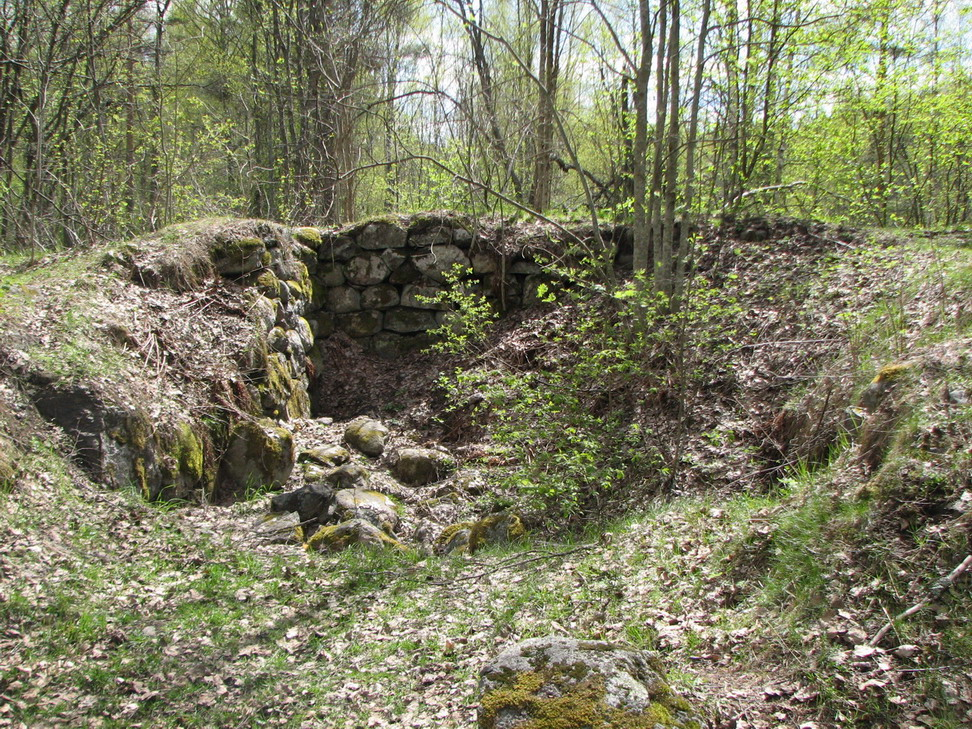 Tiversk, kamera in wall